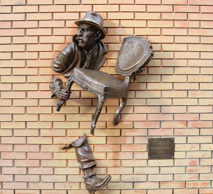 Автор скульптуры Катиб Мамедов